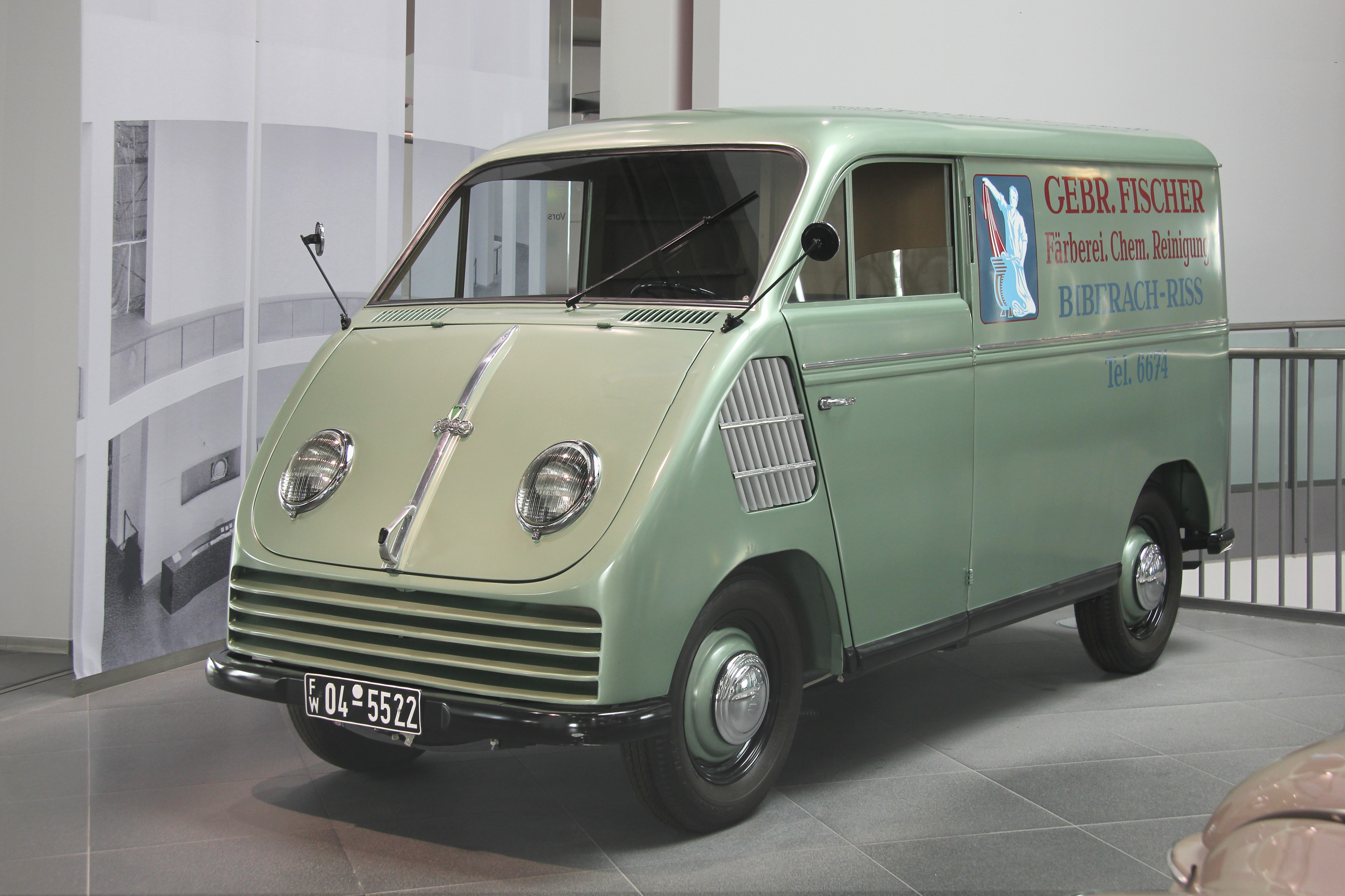 DKW F89 L Schnelllaster, 2-Zylinder-Zweitaktmotor, 684 cm³, 20 PS bei 3600/min, Baujahr 1950, im museum mobile. 28.263 dieser Wagen wurden von 1949 bis 1954 gebaut.